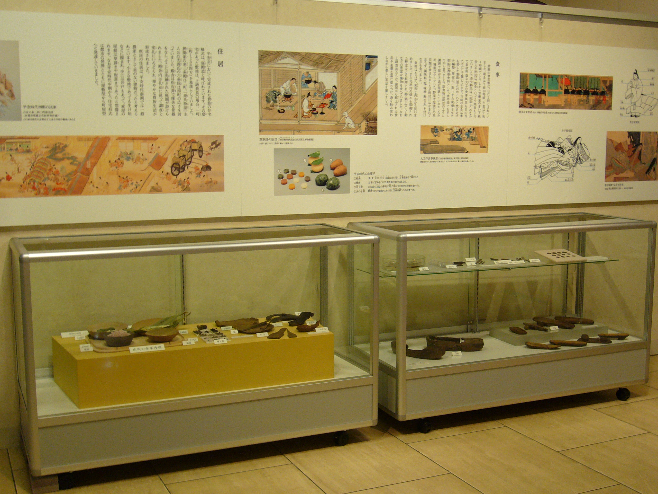 Heianjidainokurashi